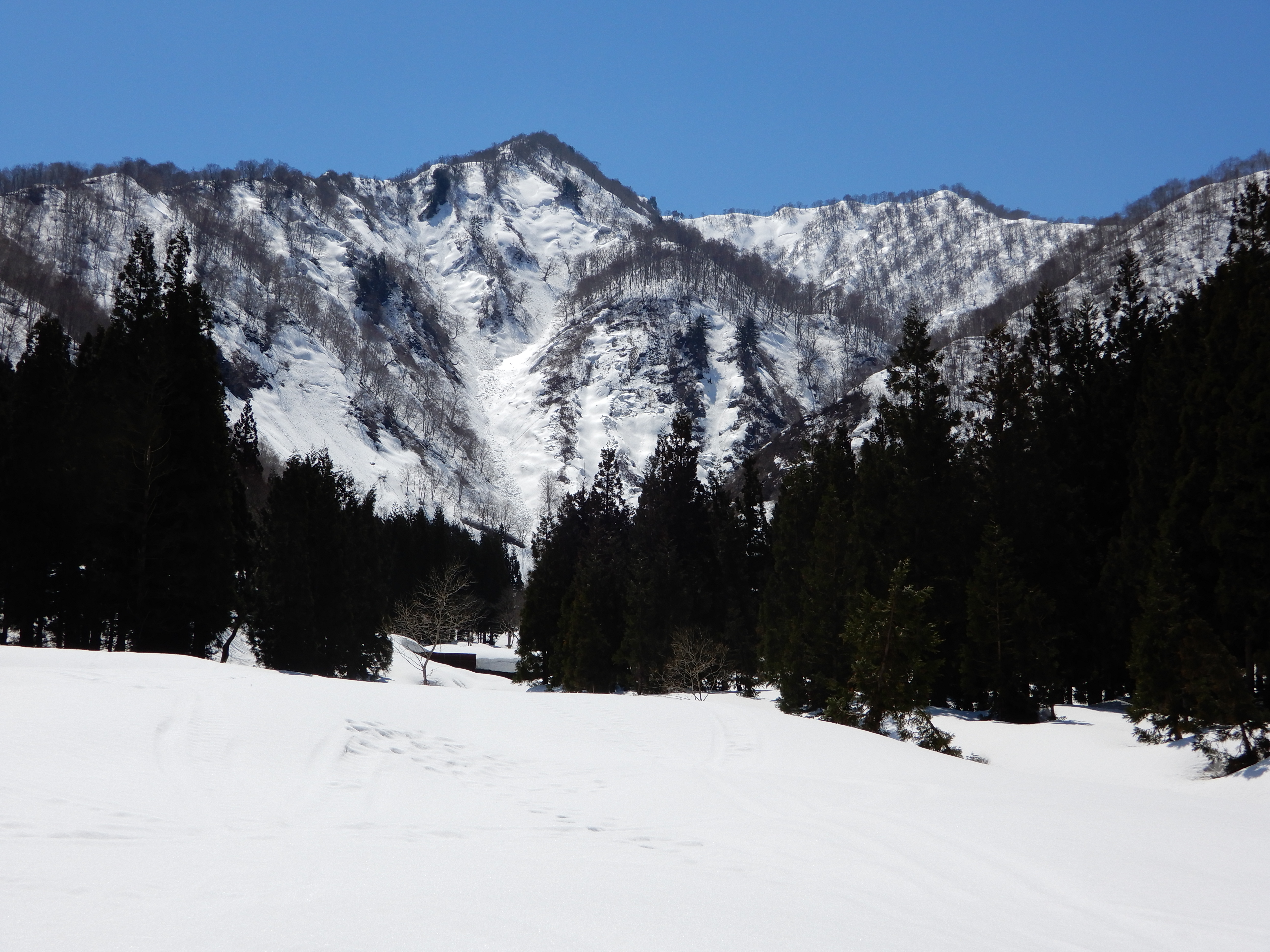 ロクロ沢より（2019.04.13）